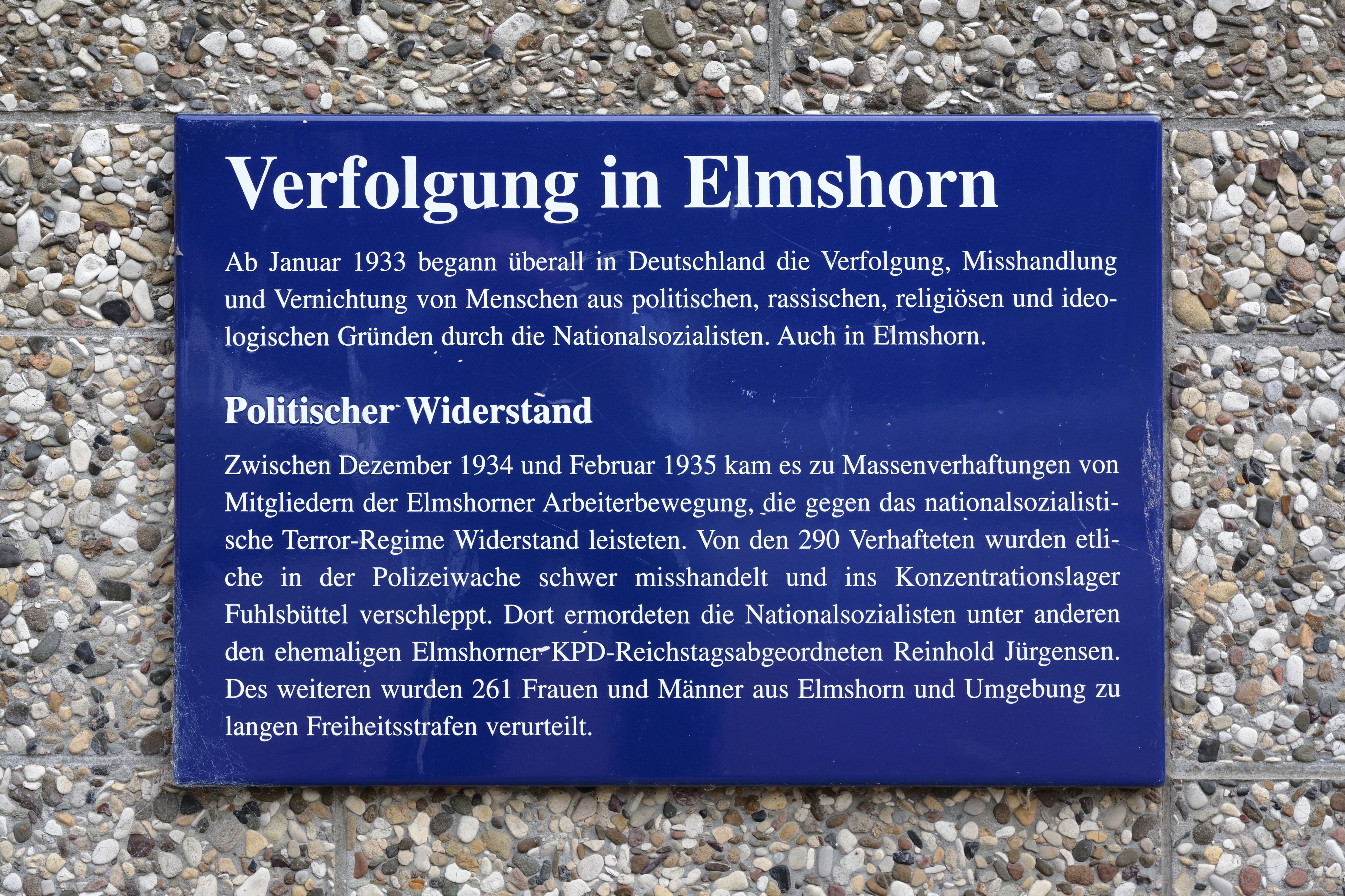 Gedenkstein und -tafel am Rathaus Elmshorn